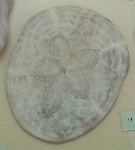 Clypeaster subdepressus (Gray, 1825). Acervo de invertebrados marinhos do Museu Nacional/UFRJ - Rio de Janeiro, RJ, Brasil.